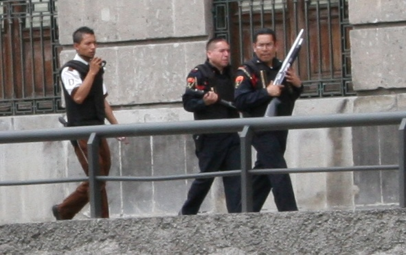 Tres elementos de seguridad en el Zócalo, Plaza Principal, Ciudad de México, México.